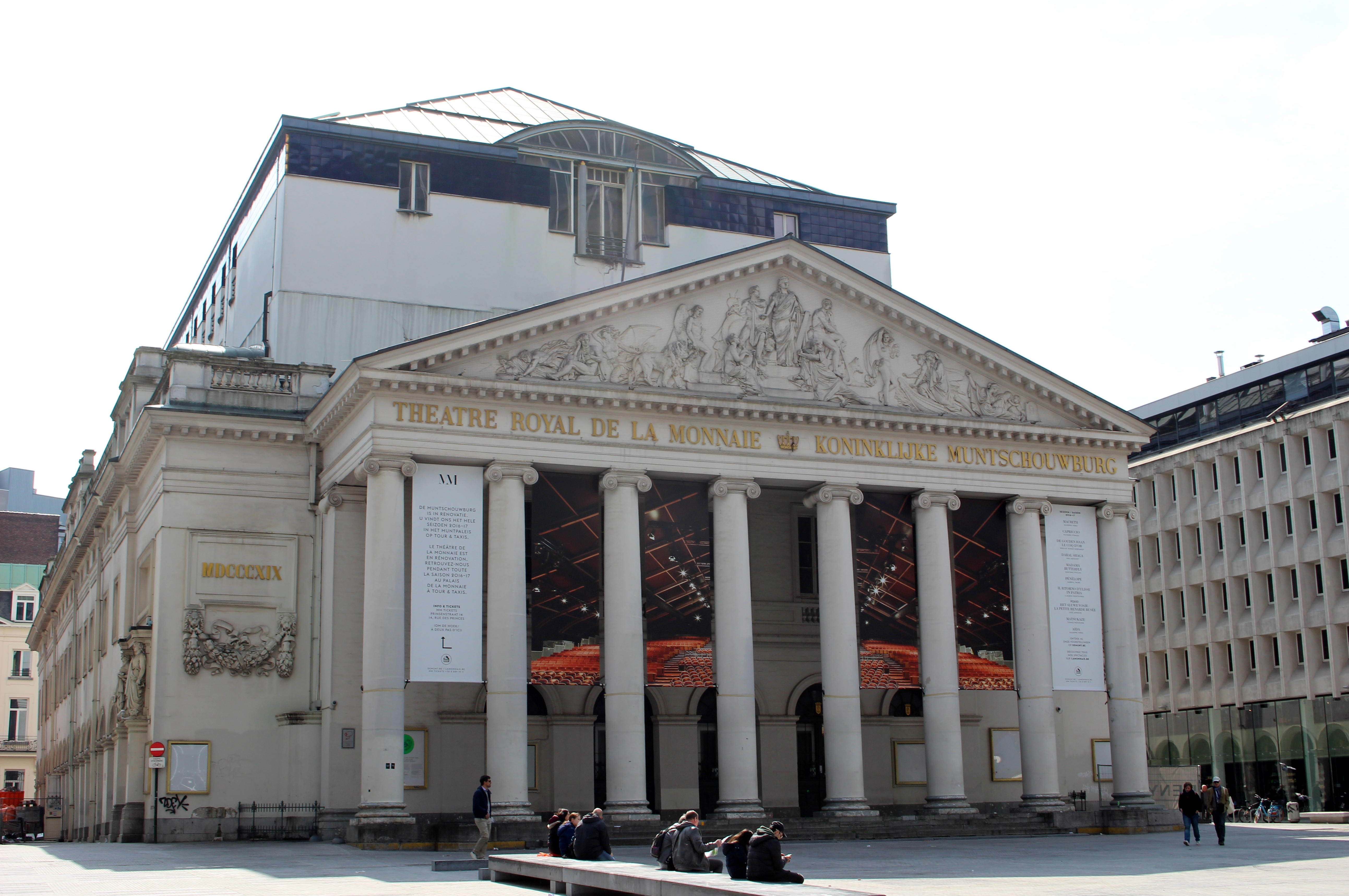 Théâtre de la Monnaie, place de la Monnaie Bruxelles